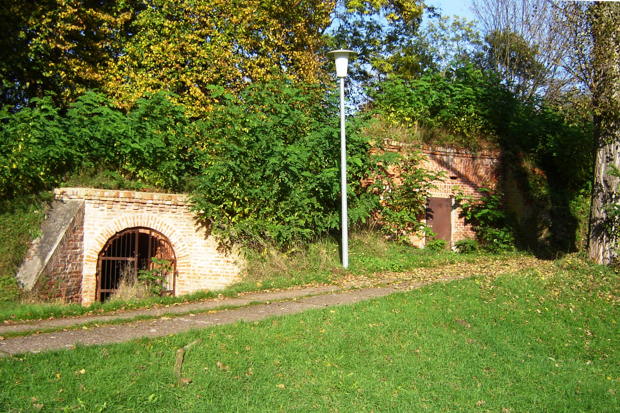 Magdeburg-Rotehorn, Fort XII, nordöstlicher Innenraum (Kulturdenkmal)